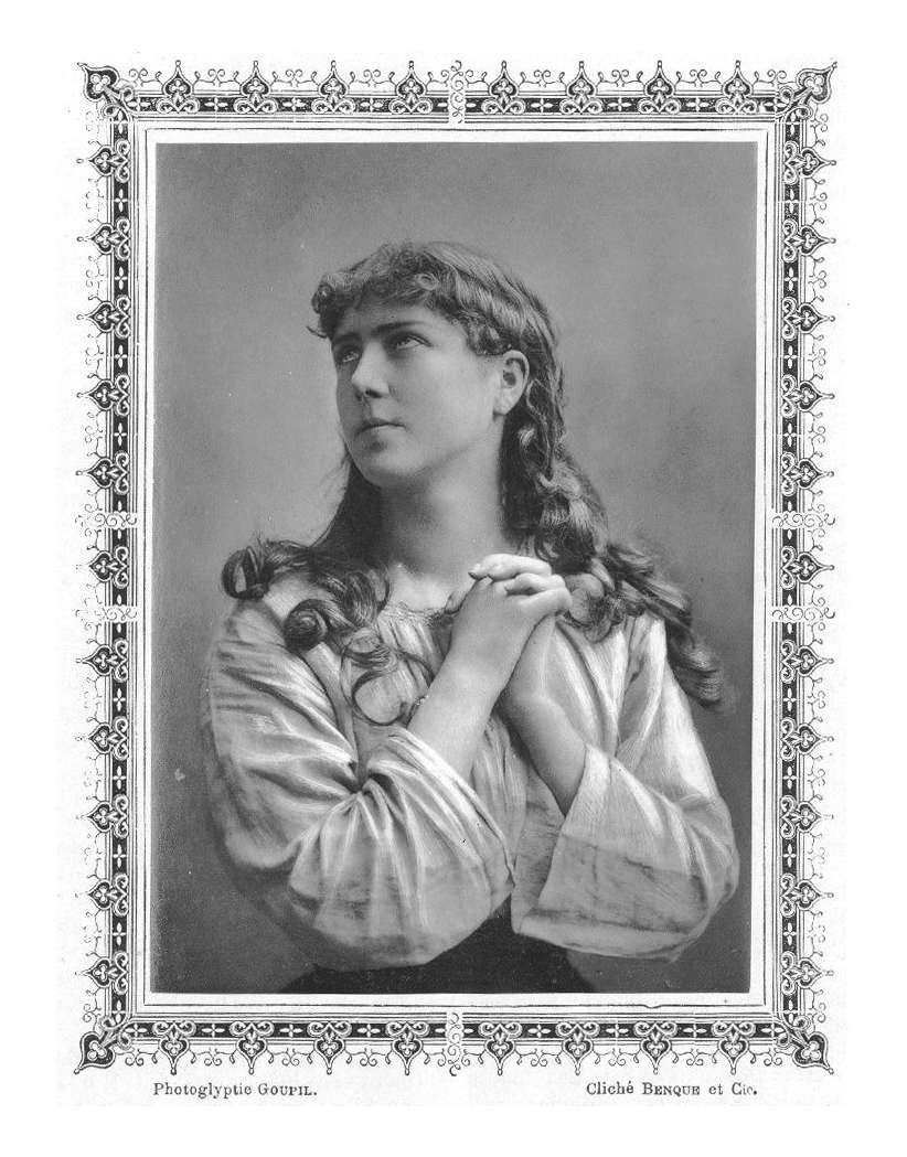 Portrait de Marie Van Zandt dans le rôle-titre de Mignon d'Ambroise Thomas à l'Opéra-Comique (1881). Détail de l'article publié dans Camées artistiques.